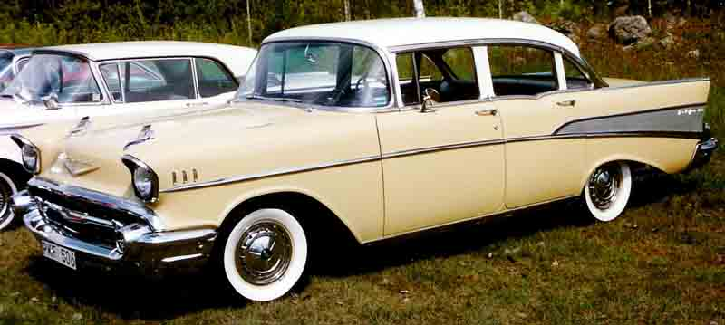 1957 Chevrolet Bel Air Series 2400C, Model 2403 Bel Air 4-Door Sedan